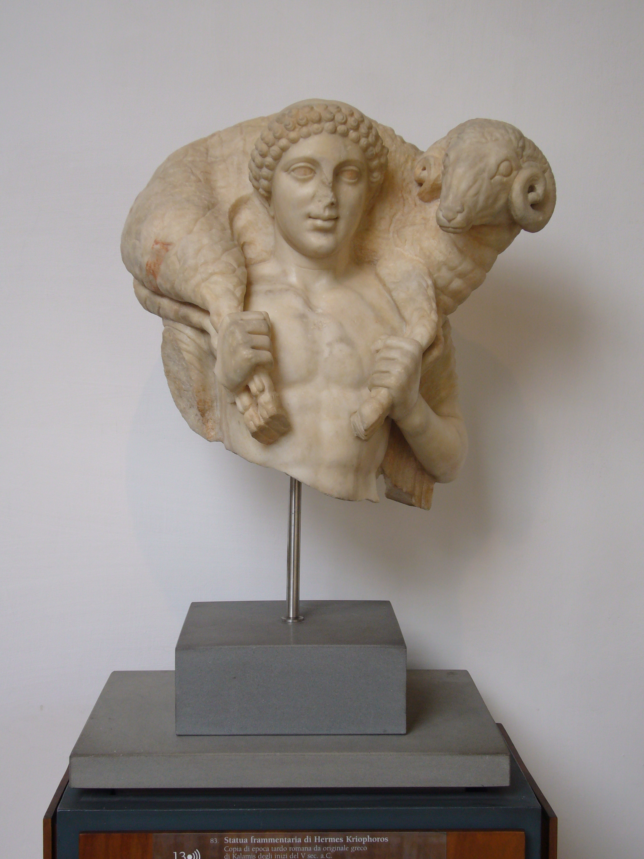 Roma, Museo Barracco: Hermes Kriophoros (= "che porta sulle spalle un ariete"). Copia tardoromana da originale greco del secolo V a.C.